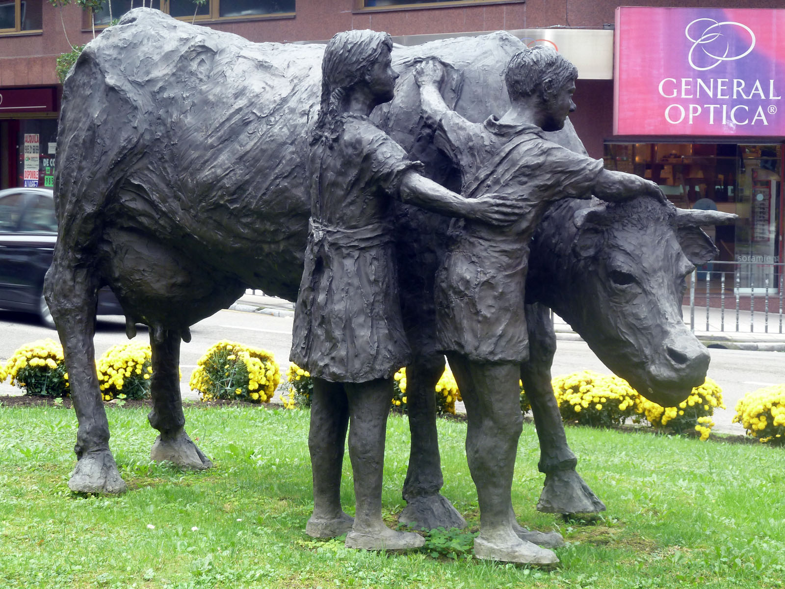 Oviedo